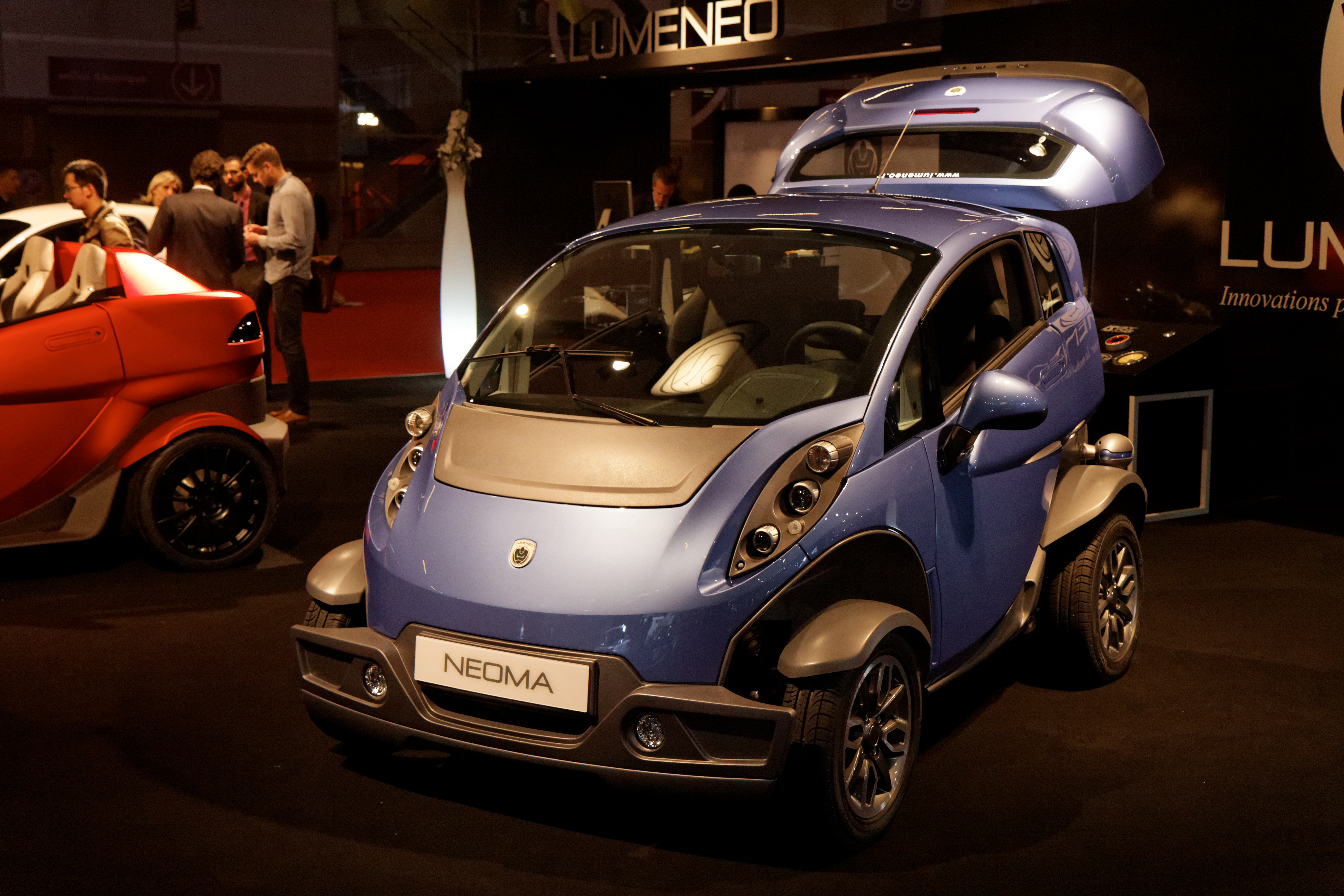 Une Lumeneo Neoma présentée lors du Mondial de l'Automobile de Paris 2012.